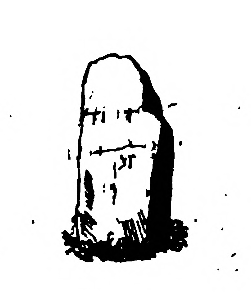 Pierre, dite jusqu'au XIXe siècle la Grande Borne, trouvée au carrefour des Quatre-Chemins (aujourd'hui les Six-Chemins) de Gensac-la-Pallue, et détruite depuis. Sa qualité de borne milliaire a été fortement remis en doute par Jean-Hippolyte Michon en 1844, le dernier à l'avoir lu. Cf. les références sur la base Mérimée, ministère de la Culture